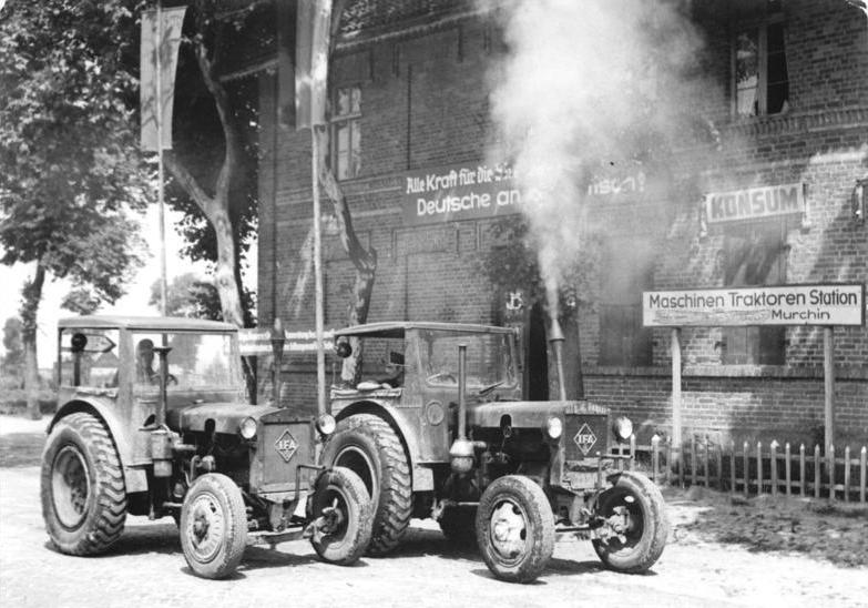 Murchin, Blick auf die MTS Zentralbild Krueger 24.6.1955 In der MTS in Murchin, Kreis Anklam. Die Maschinen-Traktoren-Station in Murchin, Kreis Anklam, hat zum Tag der Erntebereitschaft alle Geräte überholt und einsatzbereit gemacht. UBz: Blick auf den Platz vor dem Kulturhaus der MTS.